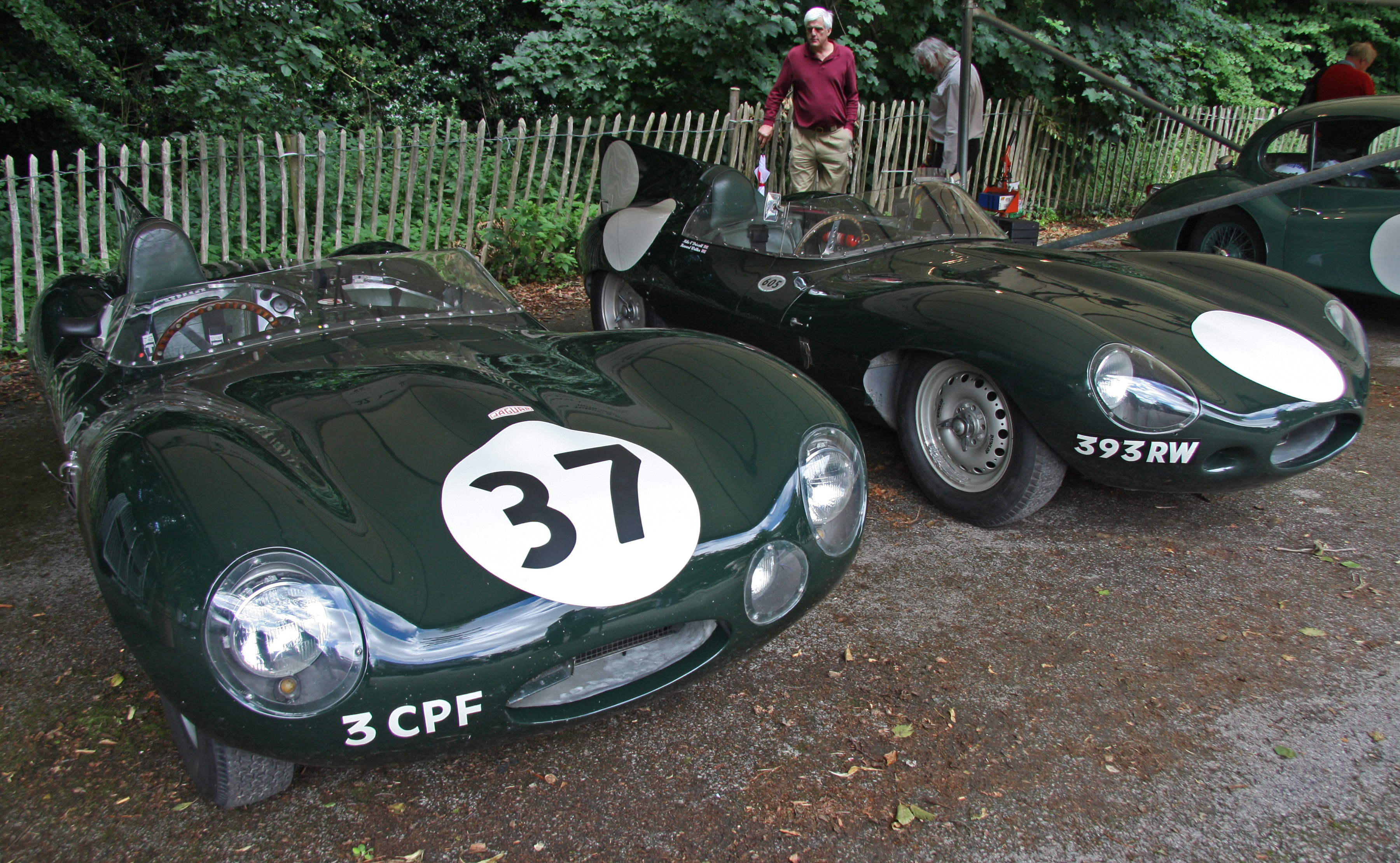 Jaguar D-Types